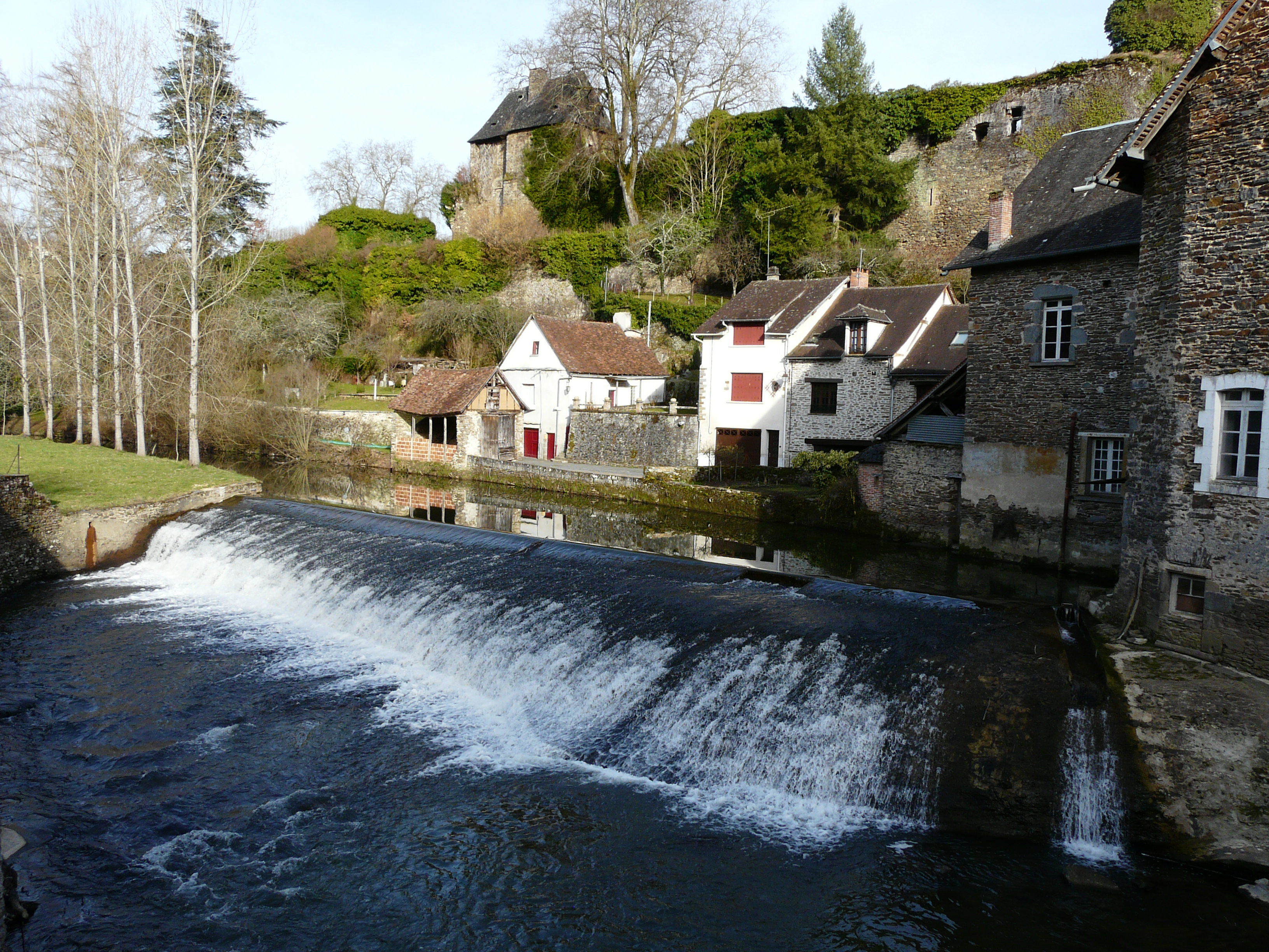 L'Auvézère à Ségur-le-Château, Corrèze, France. Vue prise en amont du pont Saint-Laurent.